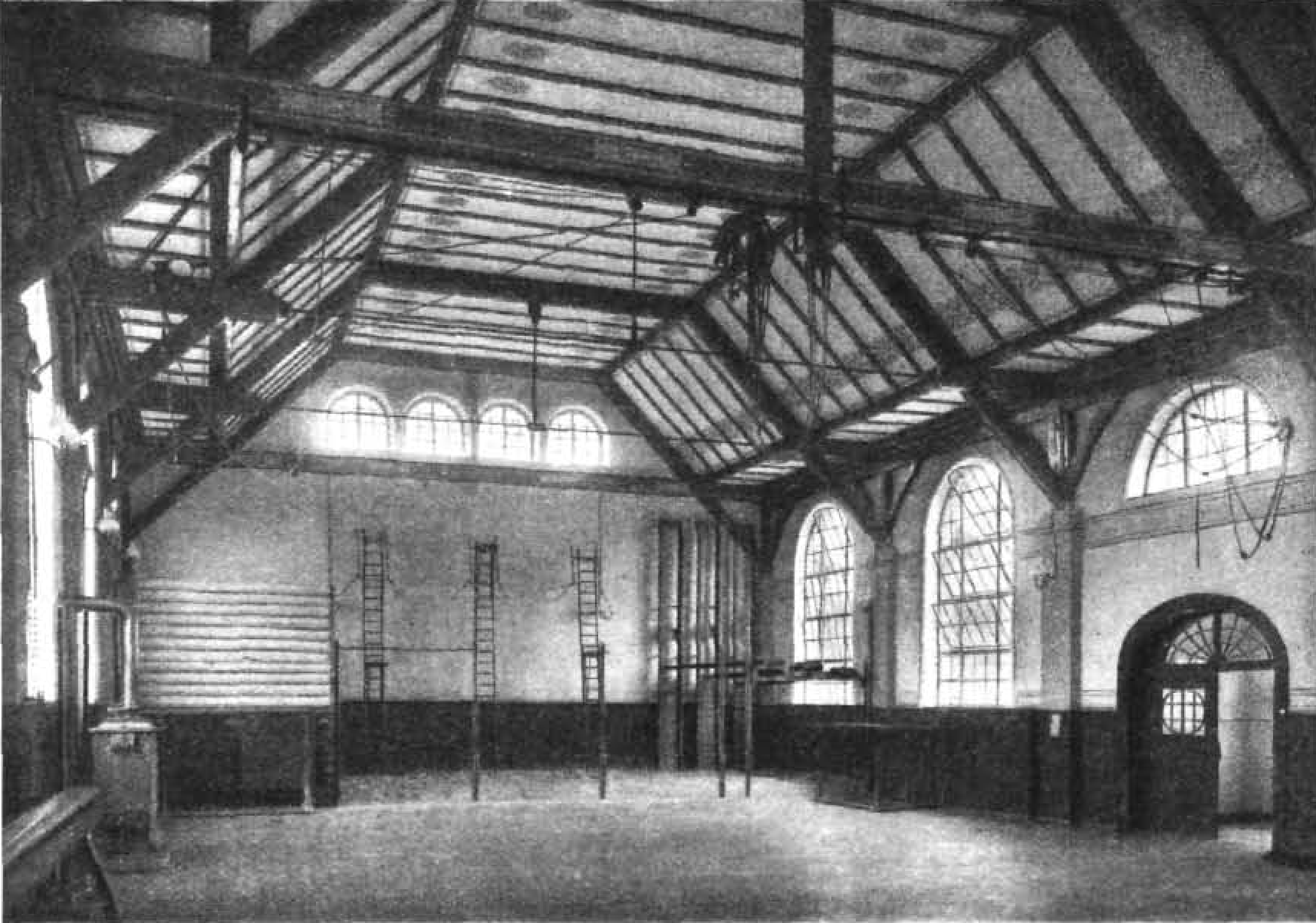 Lehrerseminar Backnang, Turnsaal